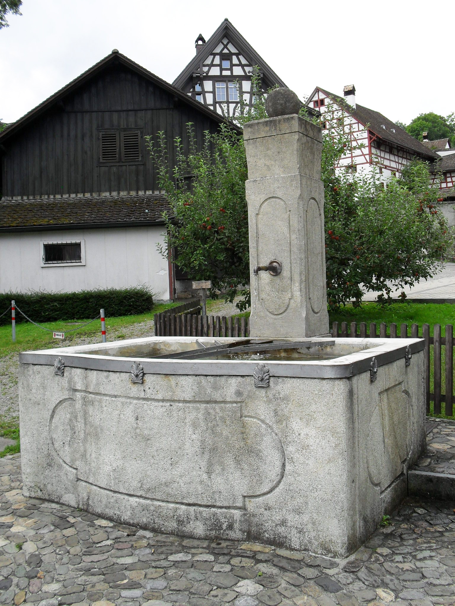 Brunnen des ehemaligen Schlosses Eglisau